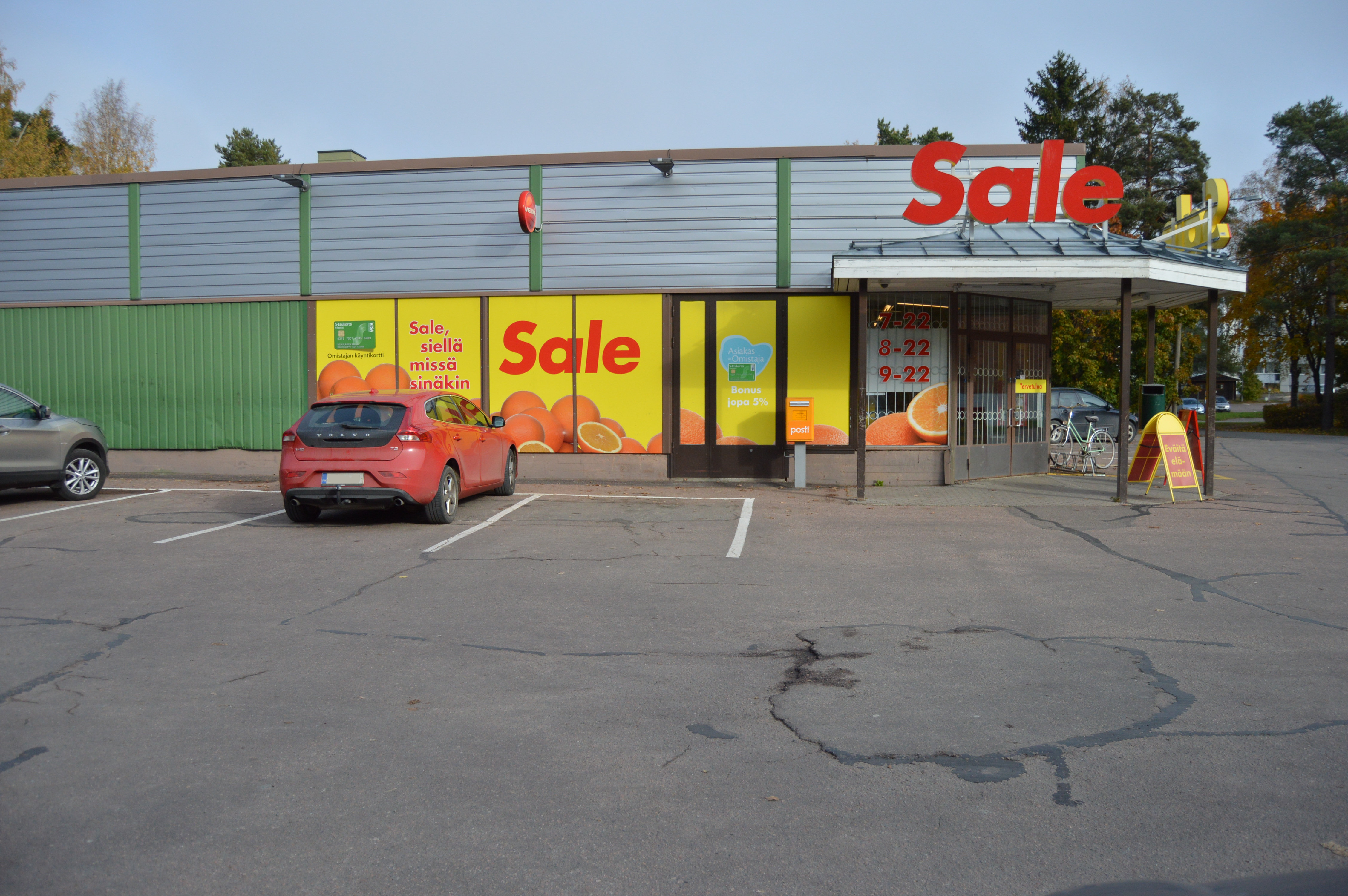 Sale-myymälä Haminan Husulassa.